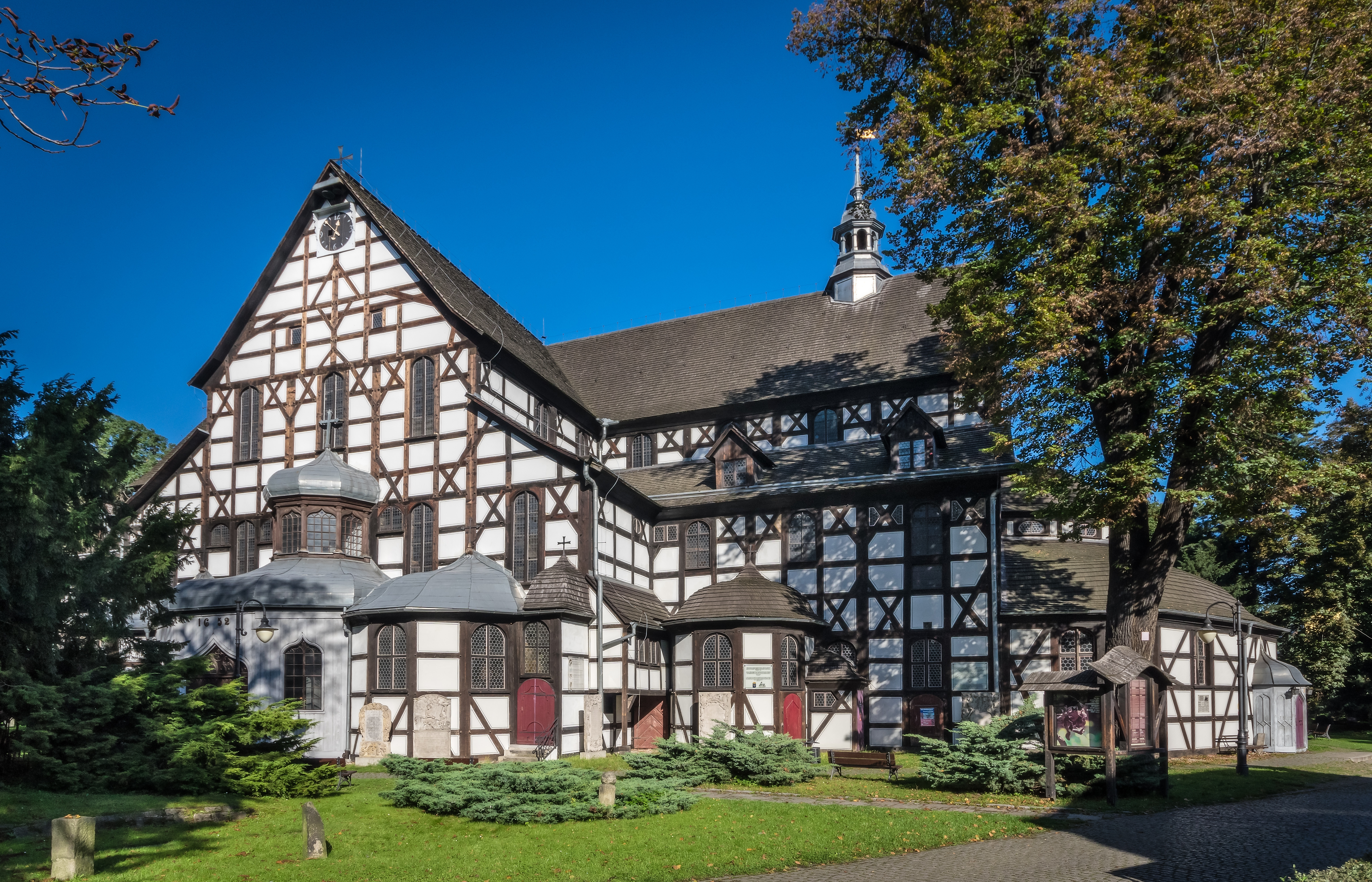 Świdnica, kościół ewangelicki (Pokoju), poł. XVII, XVIII